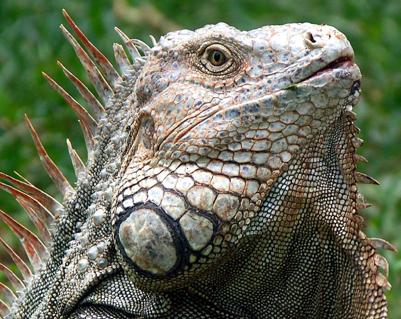 Iguana close up Costa Rica 12/2004